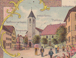 Ausschnitt einer historische Postkarte des Malers J. Steidel aus Daisbach. Sie zeigt verschiedene Ansichten der Gemeinde Eschelbronn